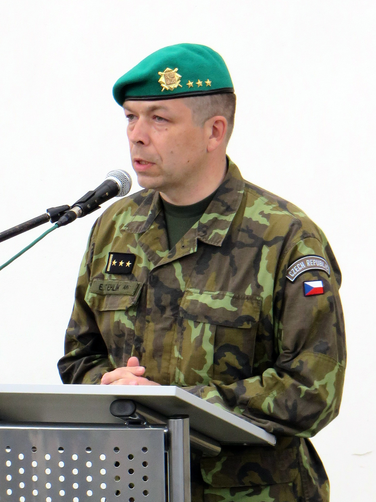 Senice. Pietní akt k uctení památky skupiny Silver A. Plk. Eduard Stehlík.